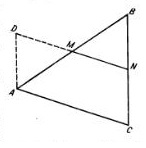 Բազմանկյուն